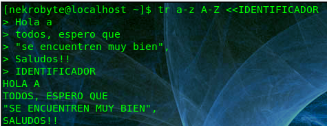 Una captura de pantalla de mi Konsole